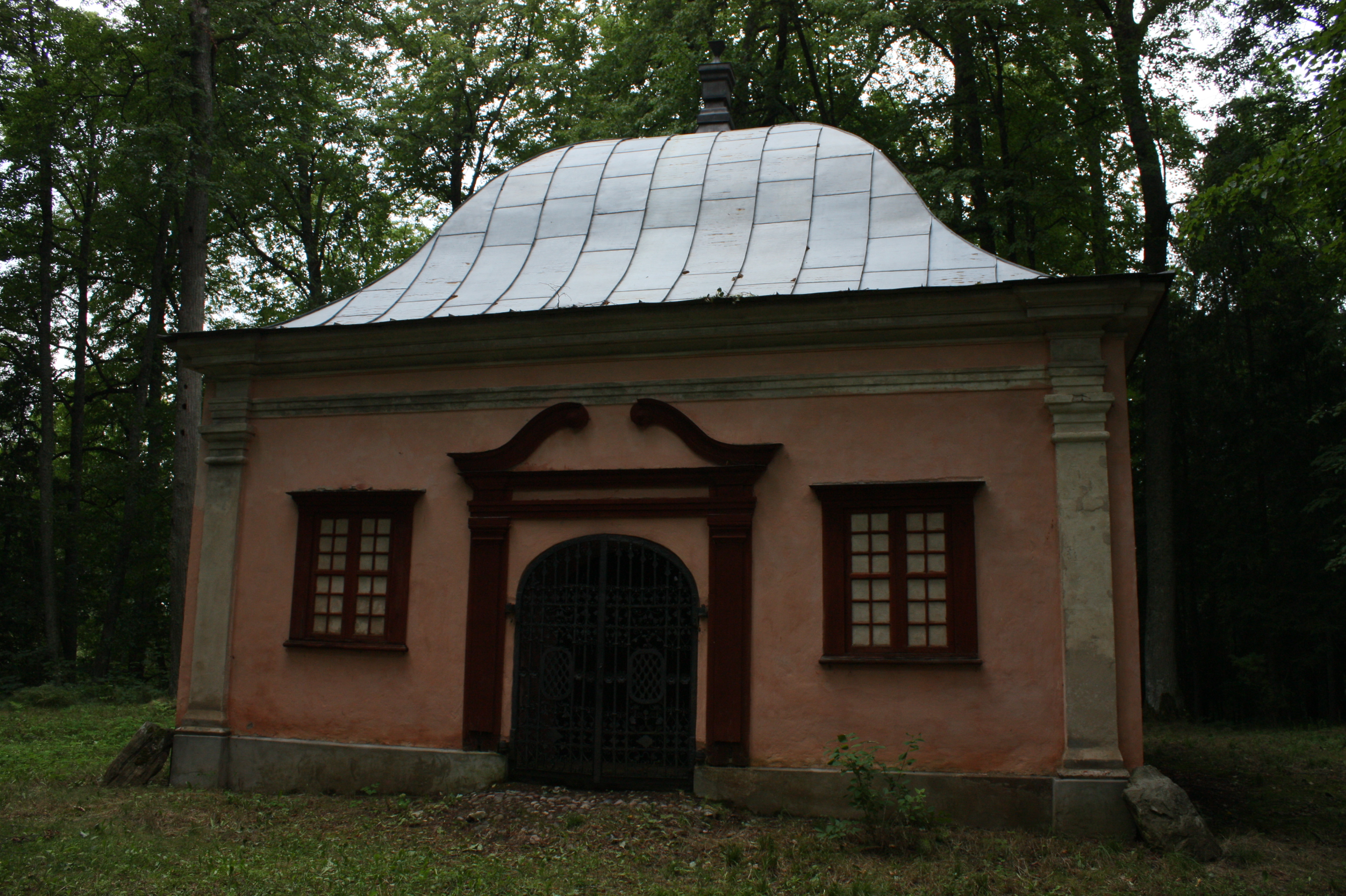 Ungurmuiža mõisa Campenhausenite kabel 2010. aastal